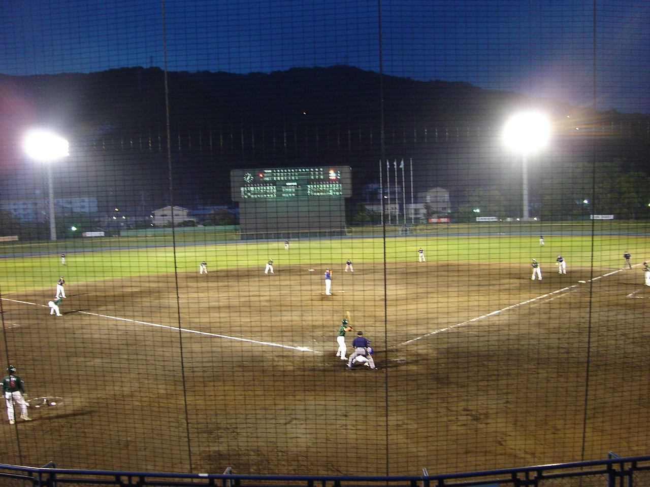 徳島県営蔵本球場。 - 日本国徳島県徳島市にある野球場。